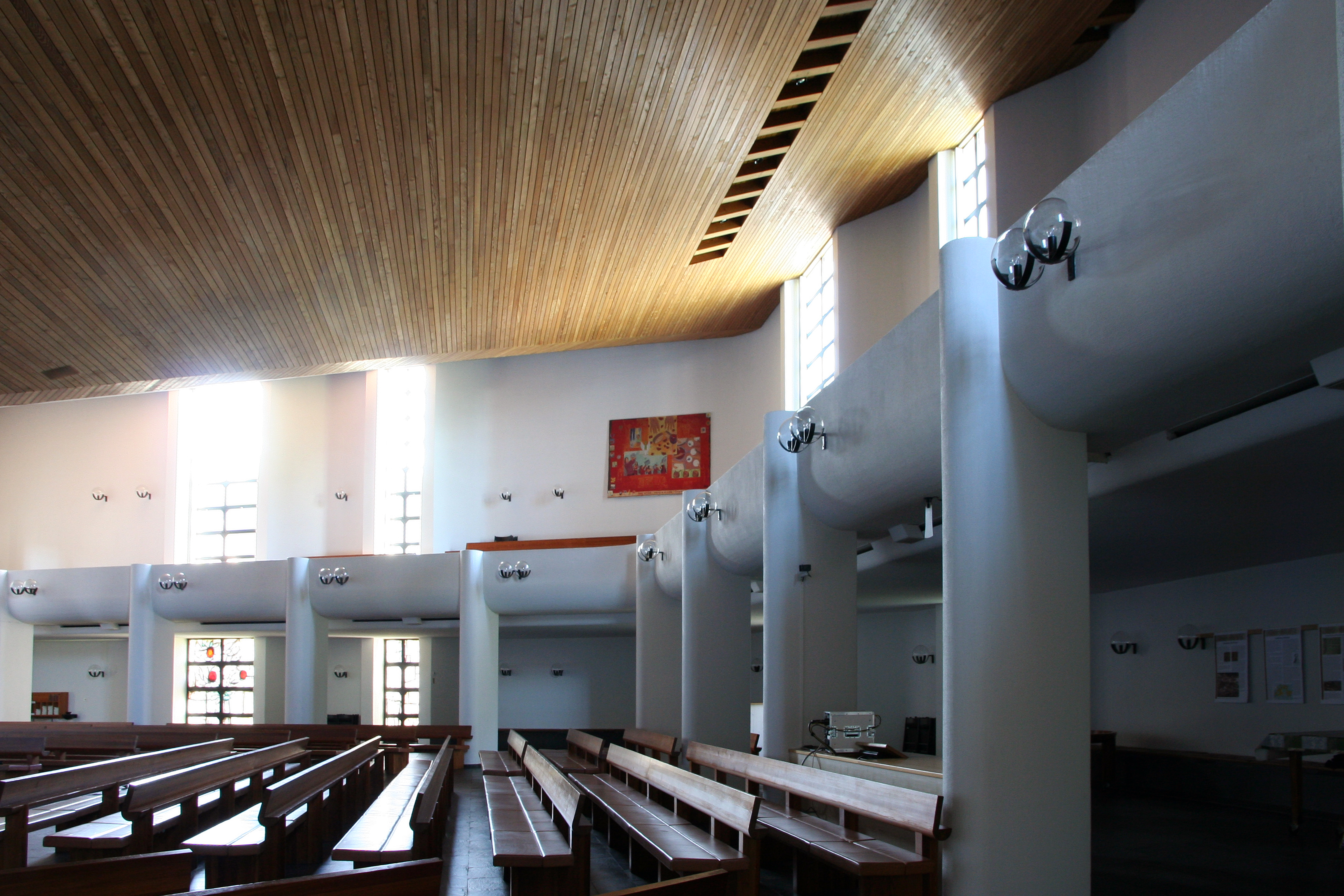 evang.-ref. Kirche Bischofszell TG